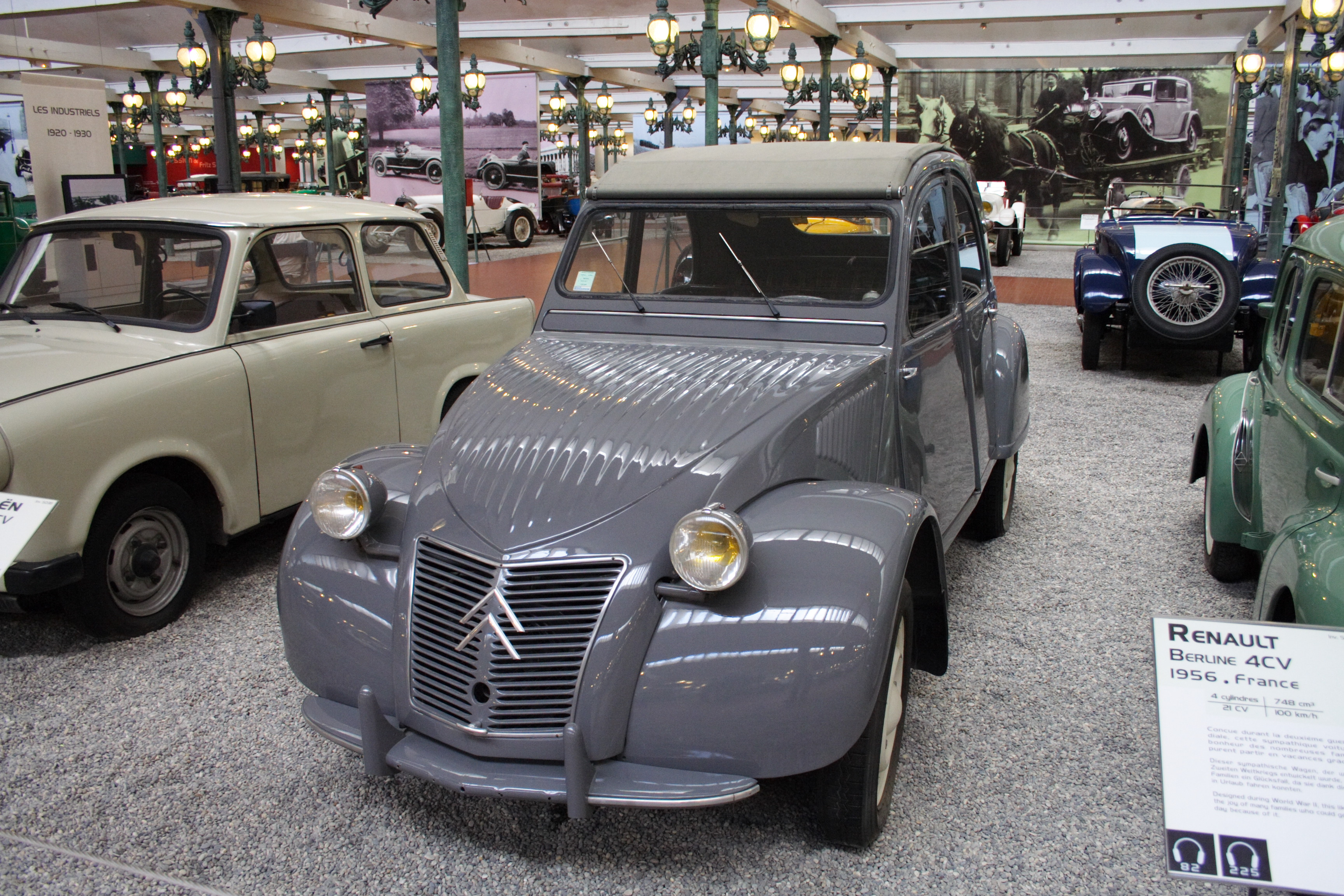 Citroen 2CV at the Musée National de l'Automobil(Mulhouse, France)